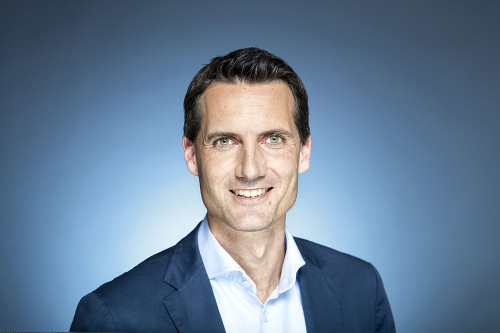 Kay Siering, SPIEGEL TV Fotograf / Copyright: Christian O. Bruch / DER SPIEGEL